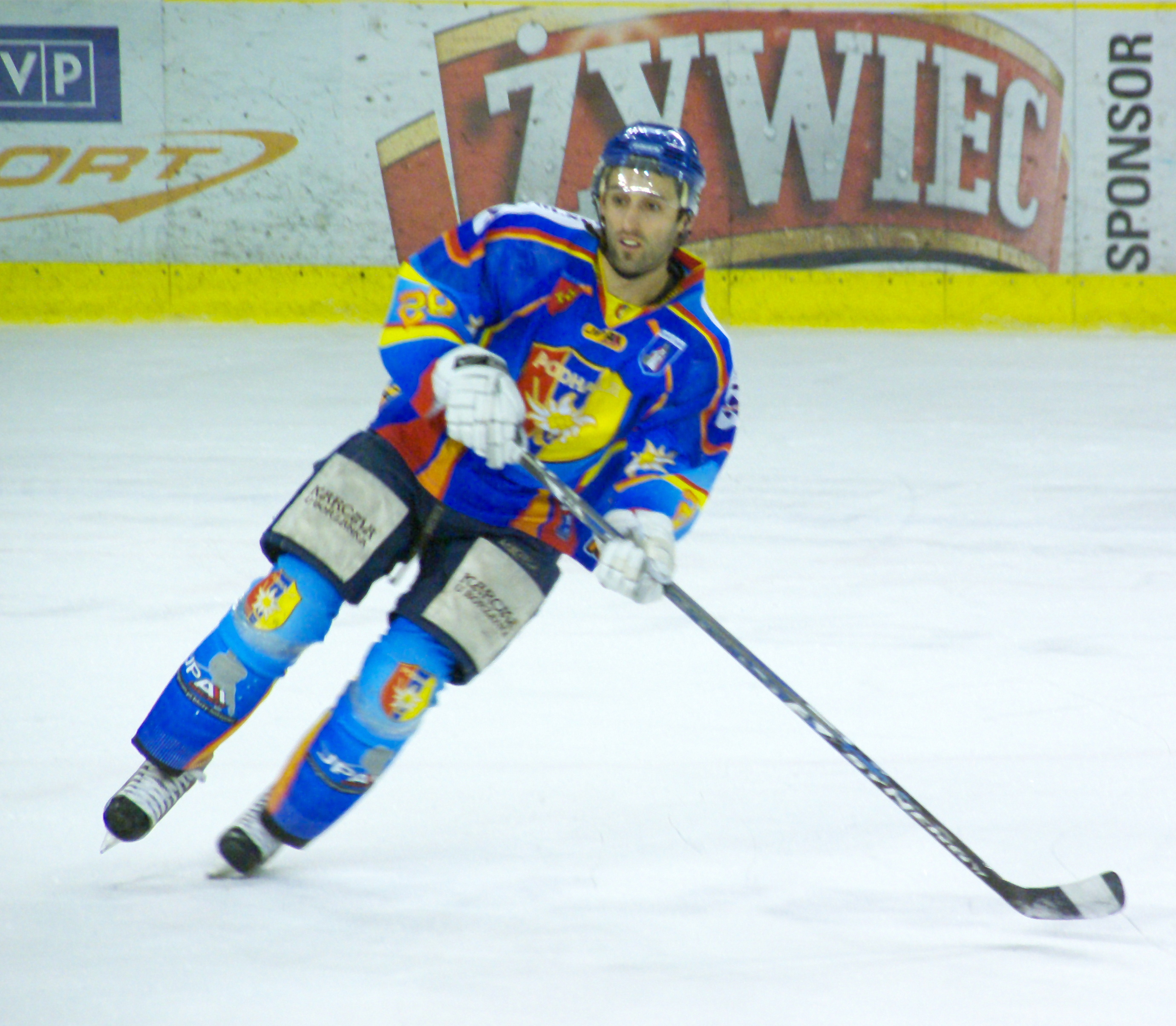 Milan Baranyk podczas meczu KH Sanok - MMKS Podhale Nowy Targ 20 marca 2011.